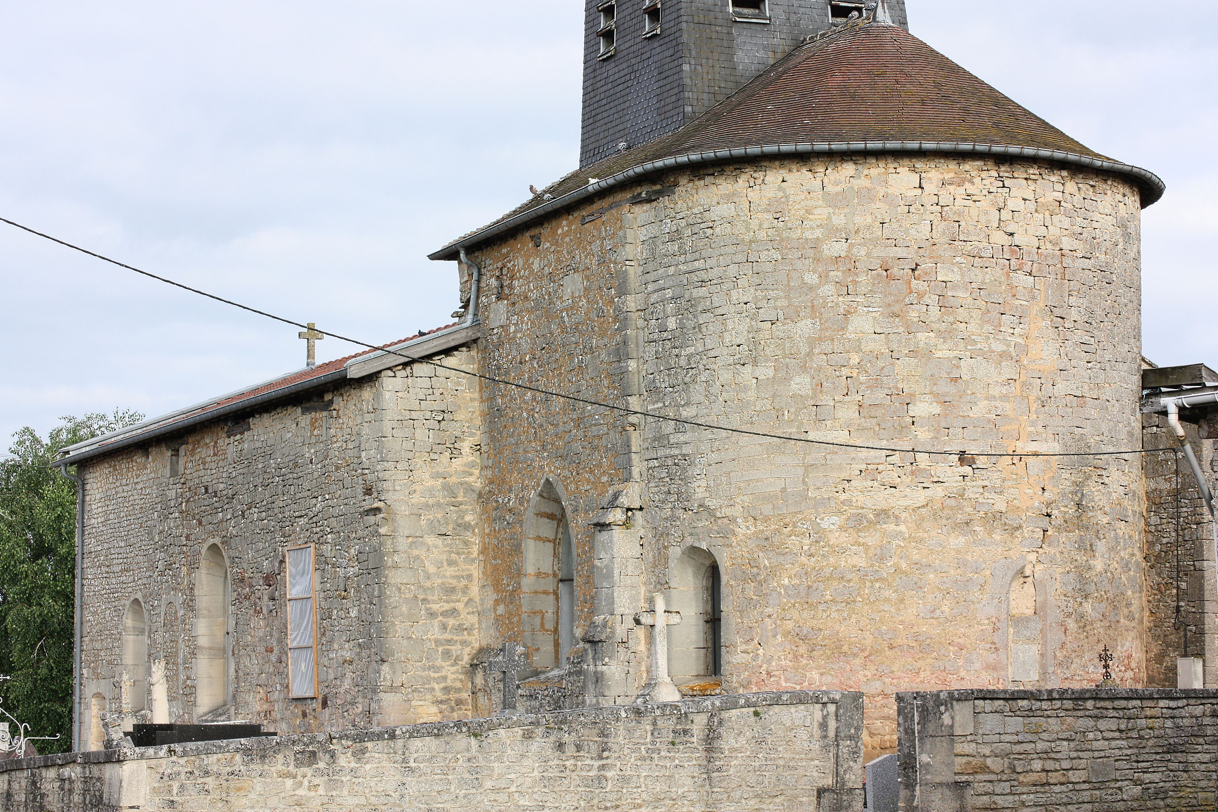 Guindrecourt-aux-Ormes - Eglise Vue du Sud-Est